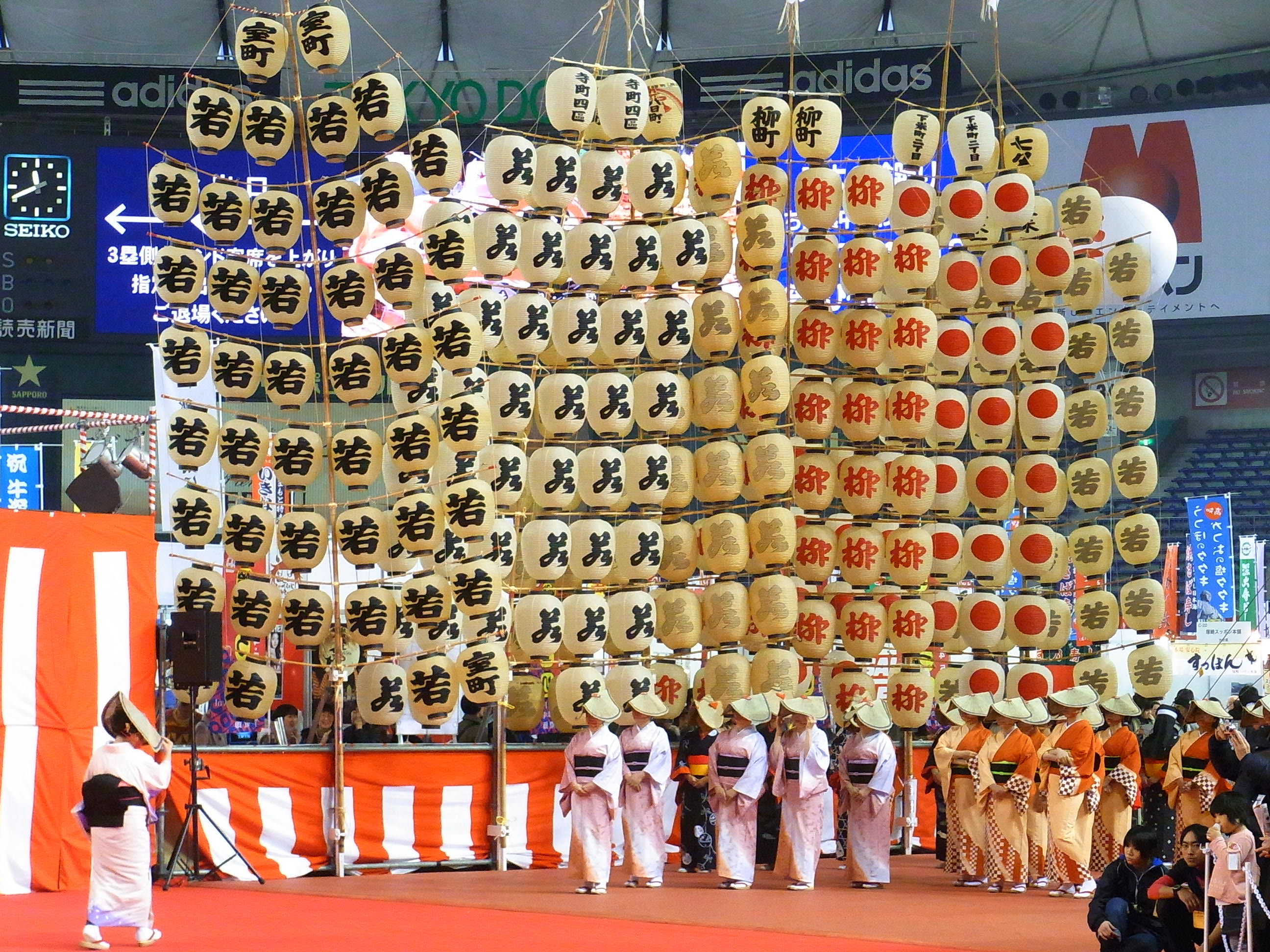 ふるさと祭（2011.1.12）